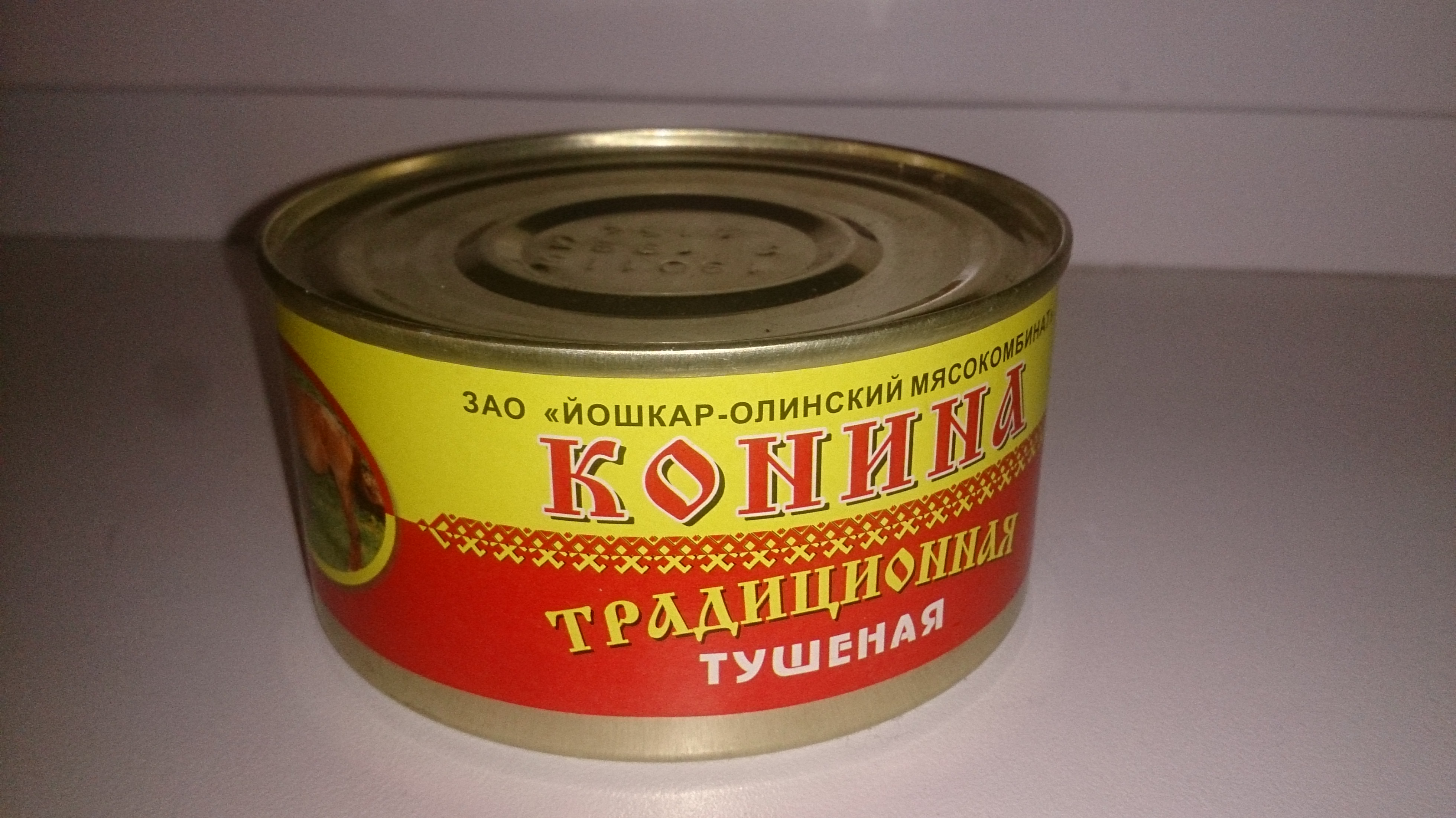 Joškar-Ola lihakombinaadi hobuselihakonserv